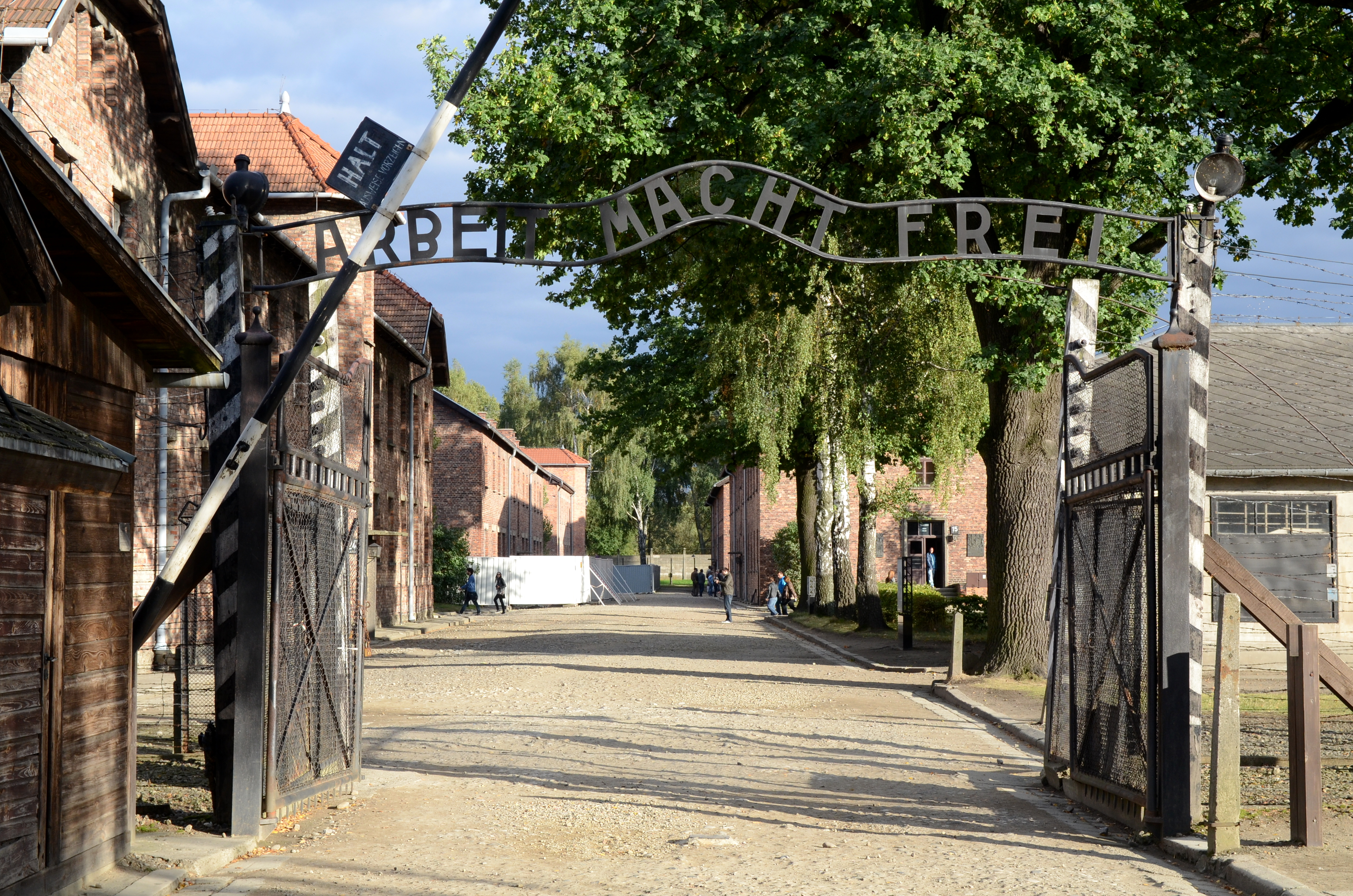 Brama do obozu Auschwitz I.